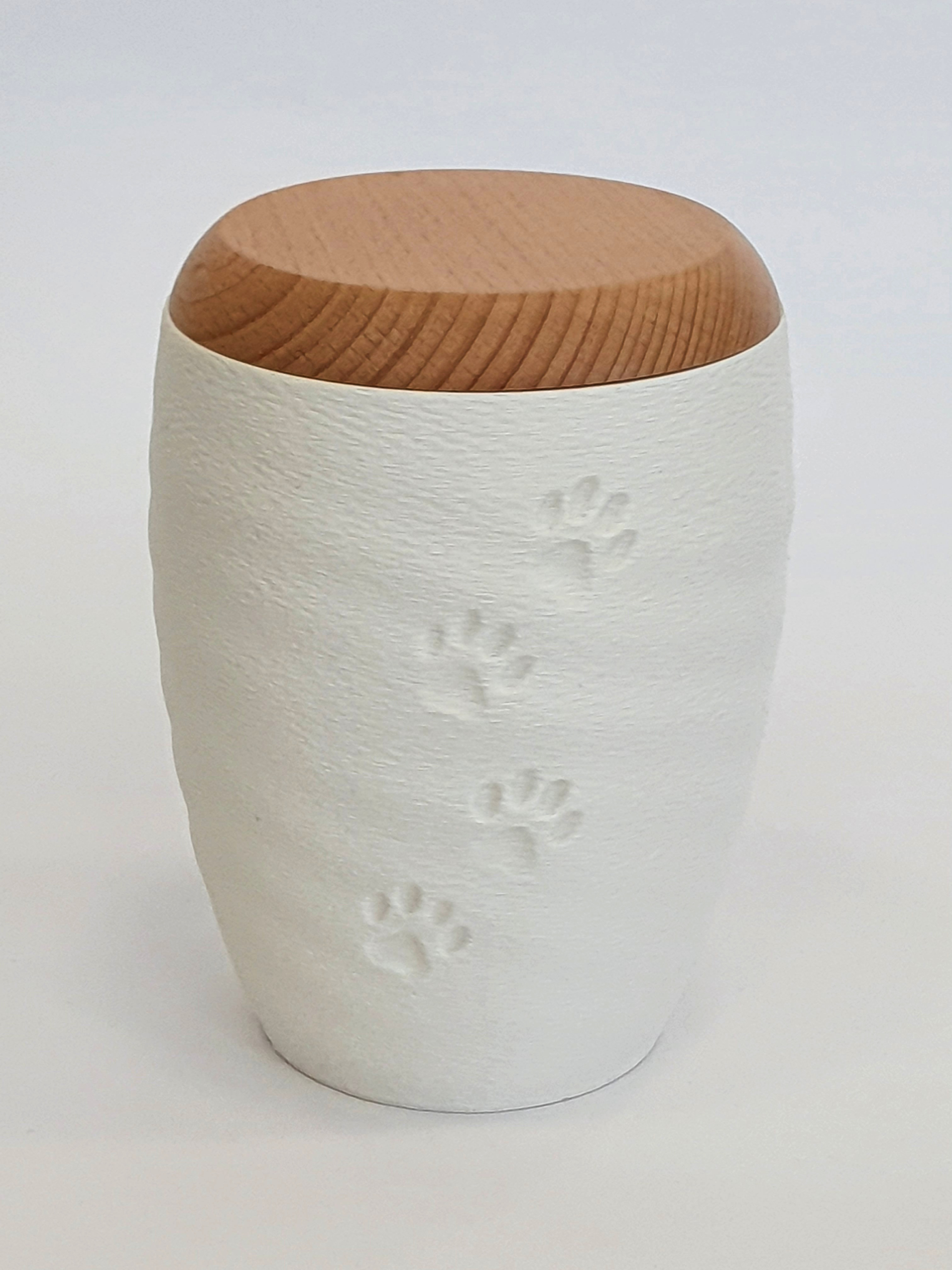 Bio Tierurne aus Biomaterial gefertigt, abbaubar, mit typischen Tierurnenmotiv Pfotenabdruck